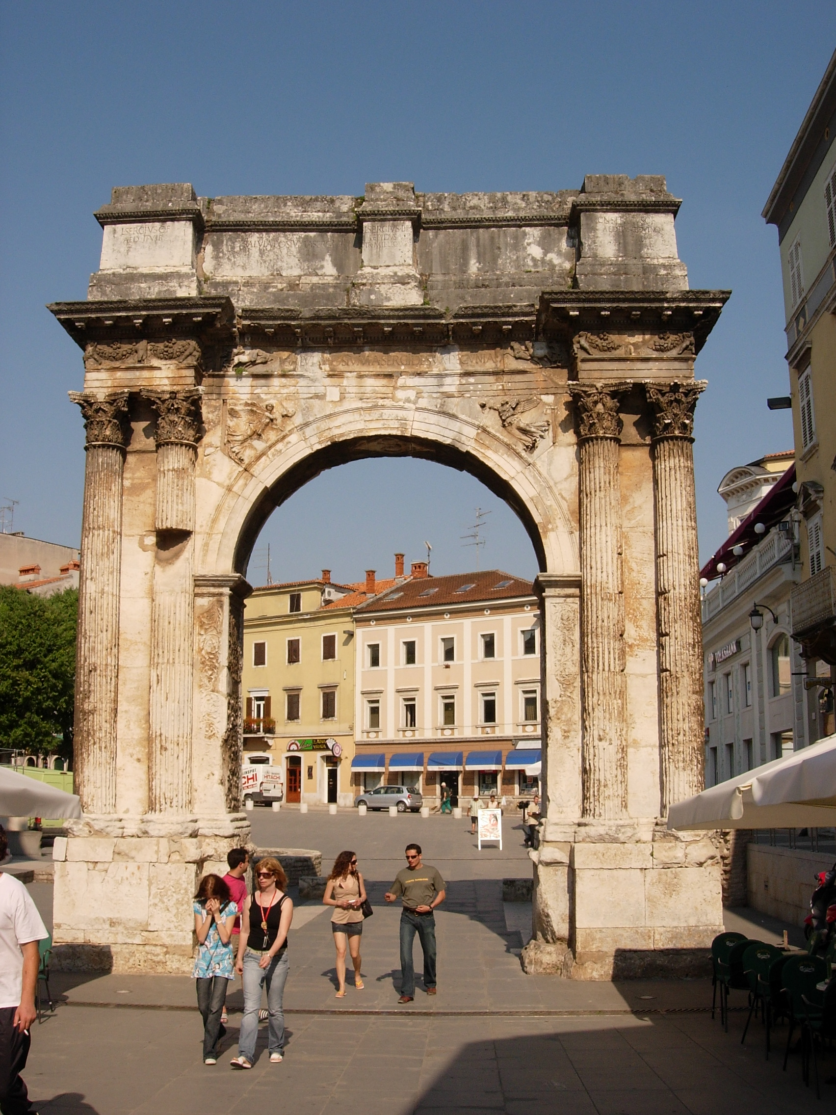 Pula